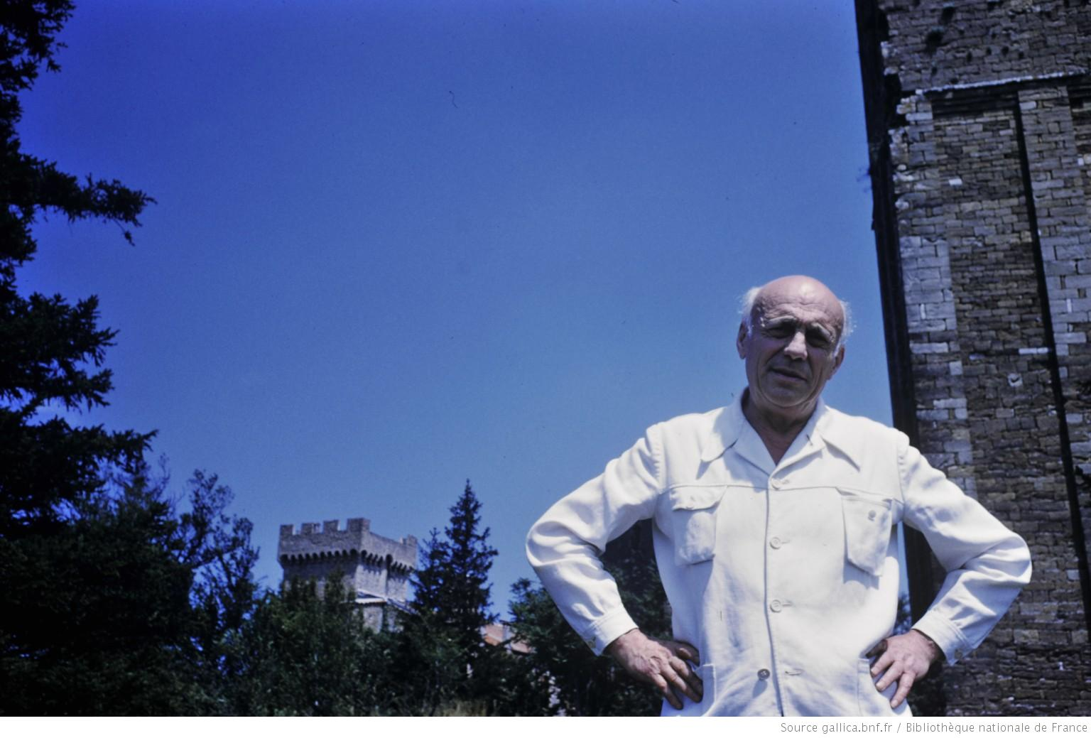 Jean Lurçat. 1963-1964 : photographies / Roger Pic. Bibliothèque nationale de France, département Arts du spectacle